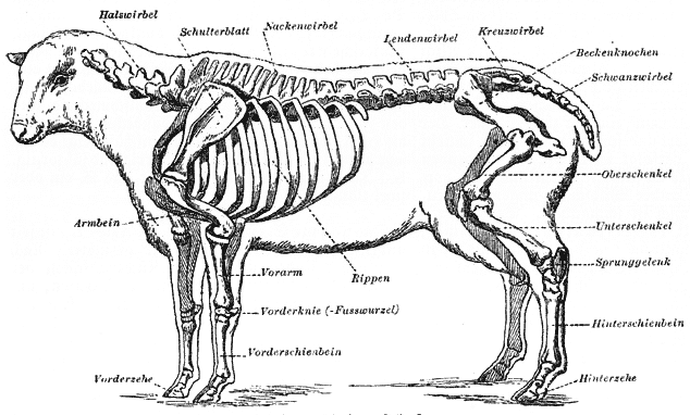 Abbildung aus Meyers Konversationslexikon 1888 - Schafskelett